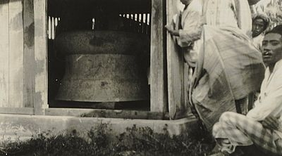 C. Ribbe, seorang peneliti asal Belanda pada tahun 1882 mengadakan penelitian untuk mengetahui asal usul gong nekara di Pulau Selayar